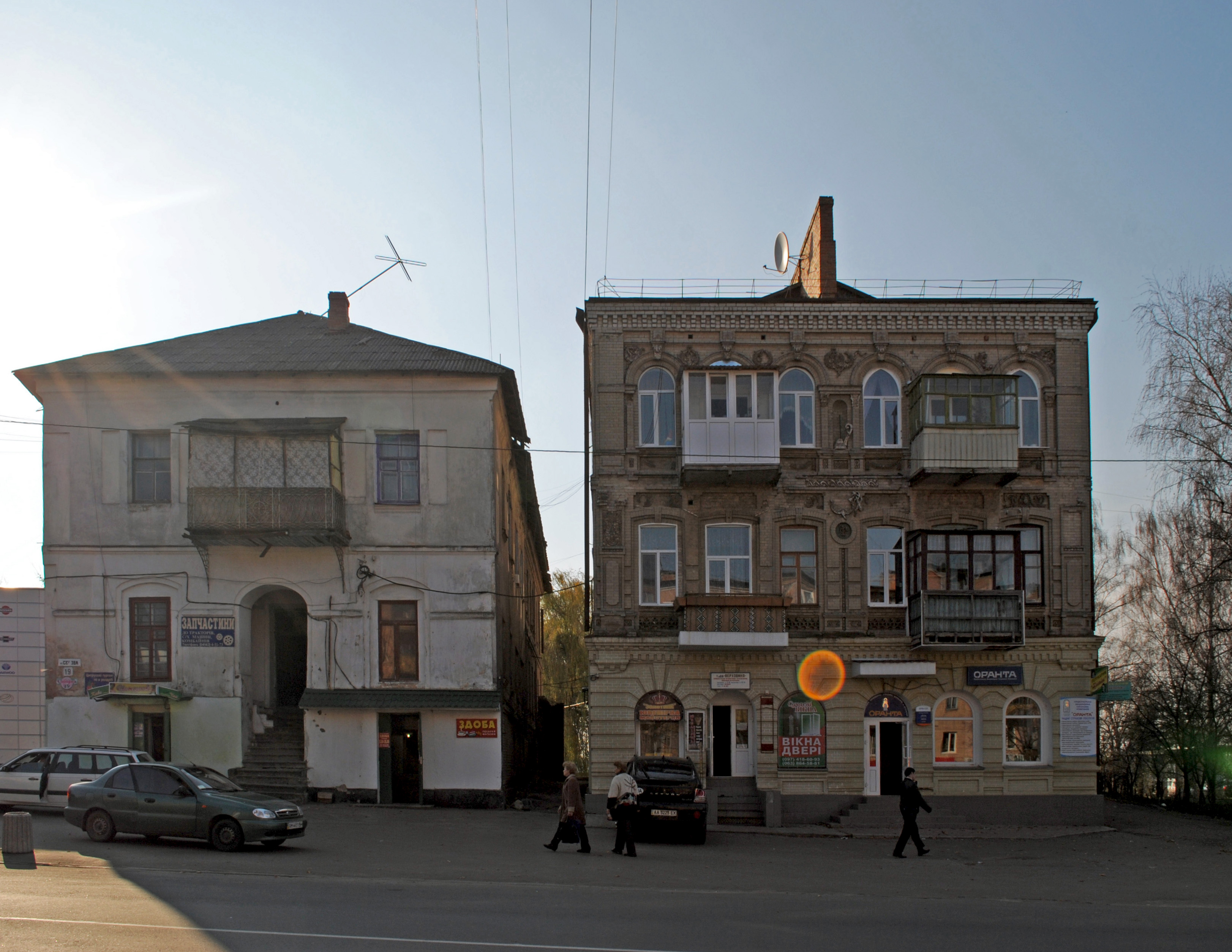 Житловий будинок, Бердичів, пл. Соборна, 21